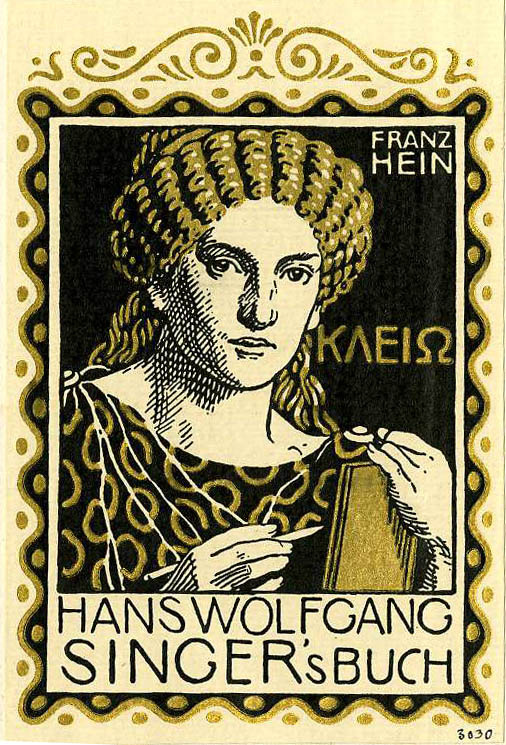 Exlibris von Franz Hein für Hans Wolfgang Singer. Maße: 85 x 127 mm (80 x 121 mm)